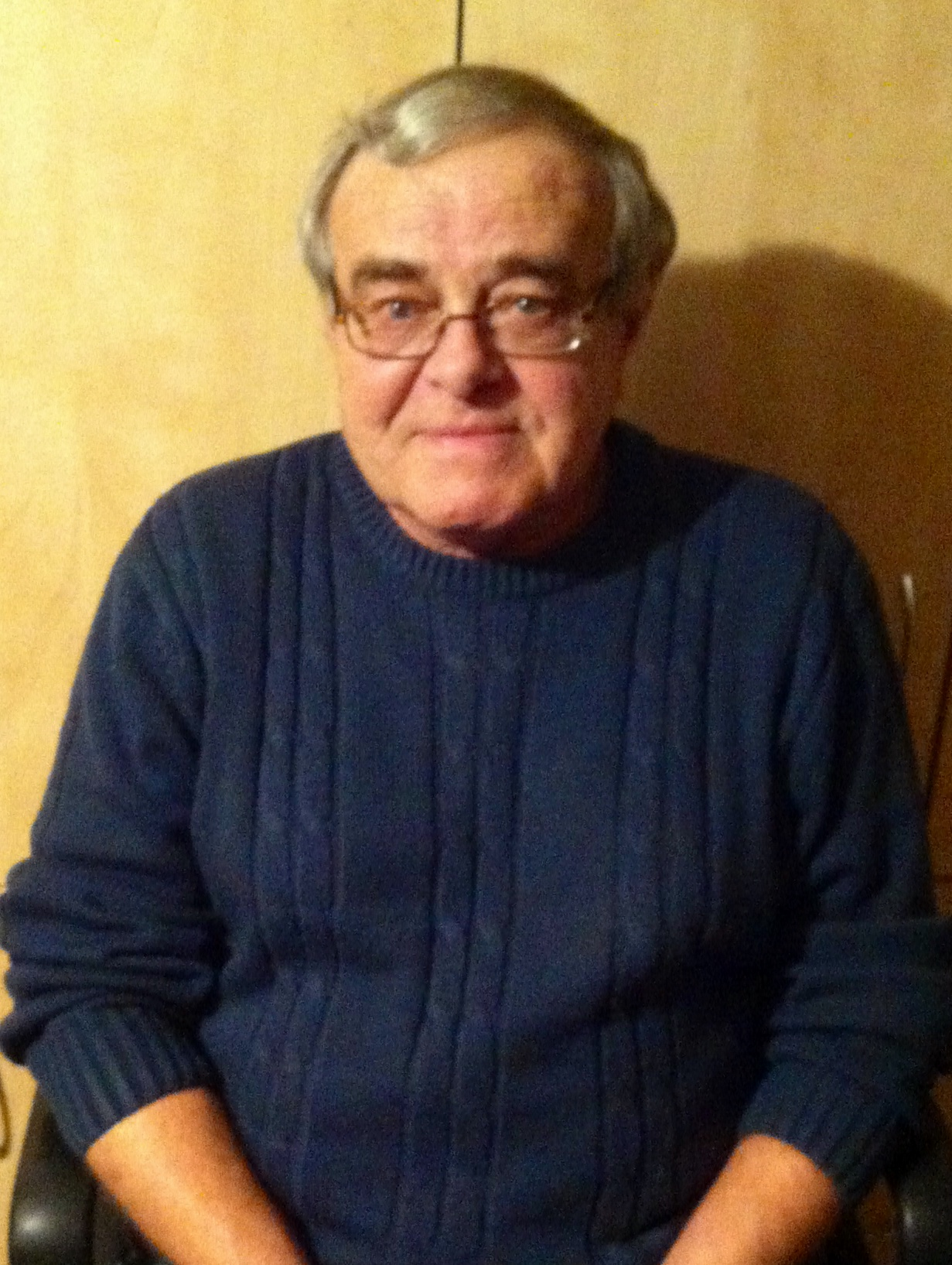 Jiří Litochleb (prosinec 2013)